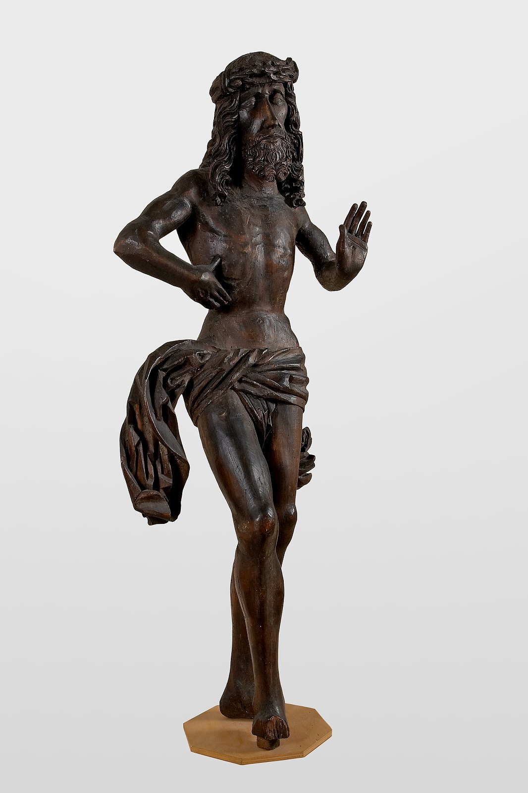 Bolestný Kristus (poč. 16. stol.), Cheb